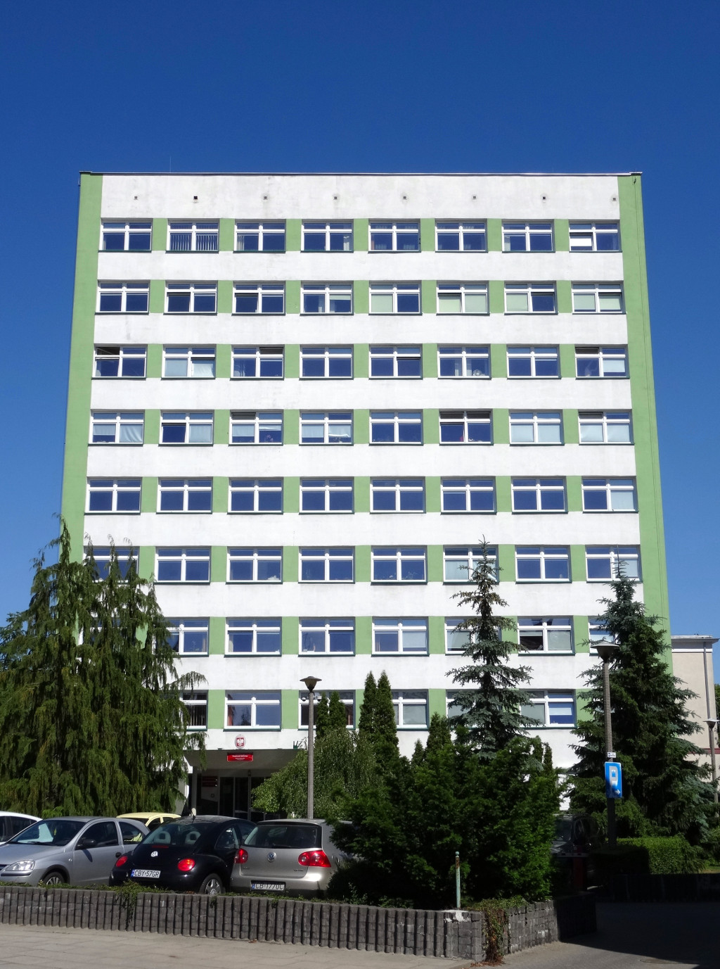 Biurowiec przy ul. Wyczólkowskiego 22 w Bydgoszczy, mieści oddział regionalny KRUS (Kasa Rolniczego Ubezpieczenia Społecznego)